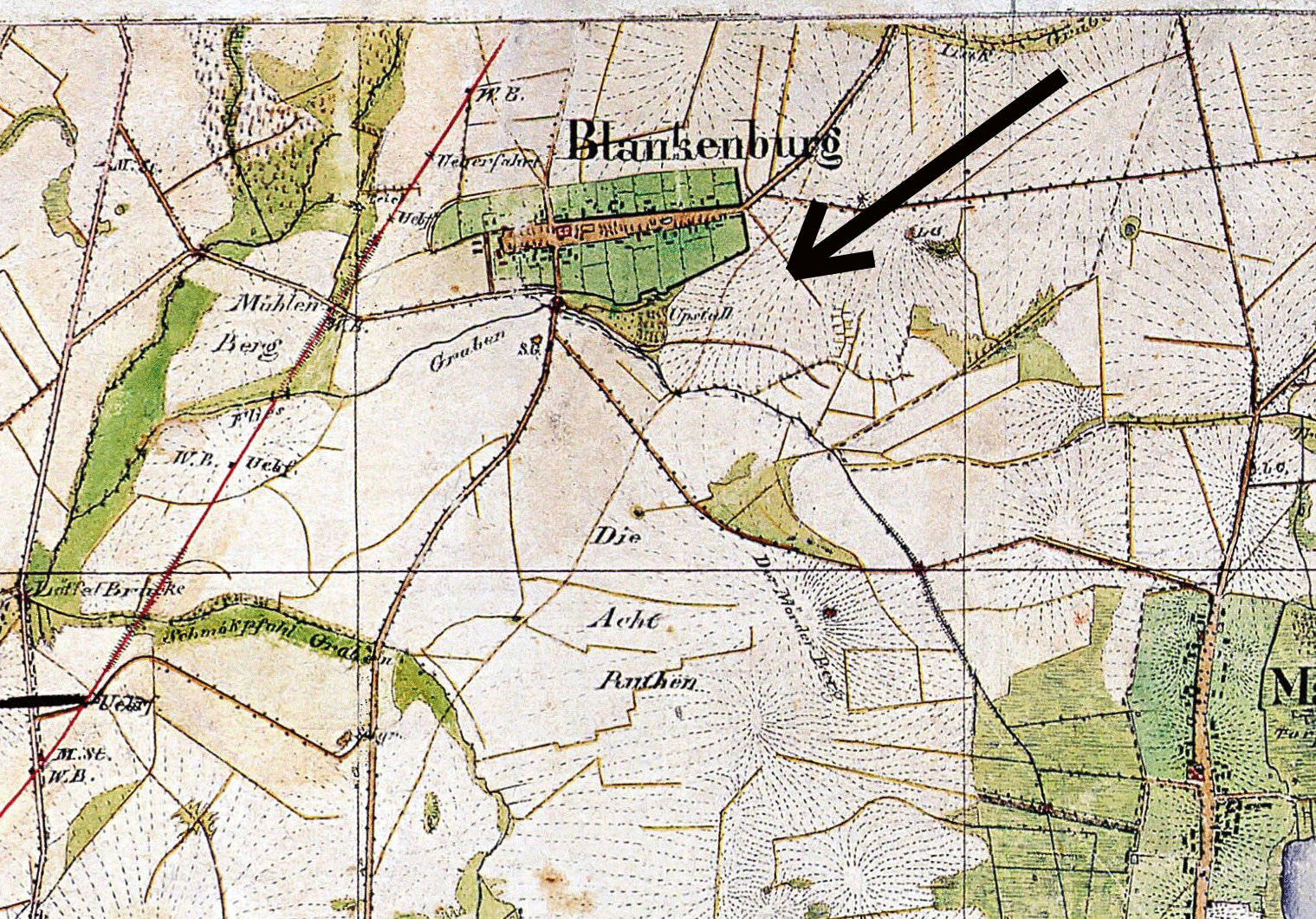 Die Lage des Upstall von Blankenburg auf dem Urmesstischblatt "Berlin (Nord)" um 1840 (Messtischblatt-Nr. 3446) * Format: 44,5 x 43,8 cm (nur der Plan) * Maßstab: 1:25.000 "Grad Abtheilung 53°/52° der Breite, 31°/32° der Länge; Bande VI. Blatt 1" Unter dem Blatt steht: "Die südliche Hälfte aufgenommen 1825 in 1/12500 Masstab, und 1832 in den Masstab 1/25000 reduciert von dem Ingenieur Geographen: Glaeser" und "Die nördliche Hälfte ist aufgenommen in Monat Juni und Juli 1831, durch Maull Ingenieur Geograph."